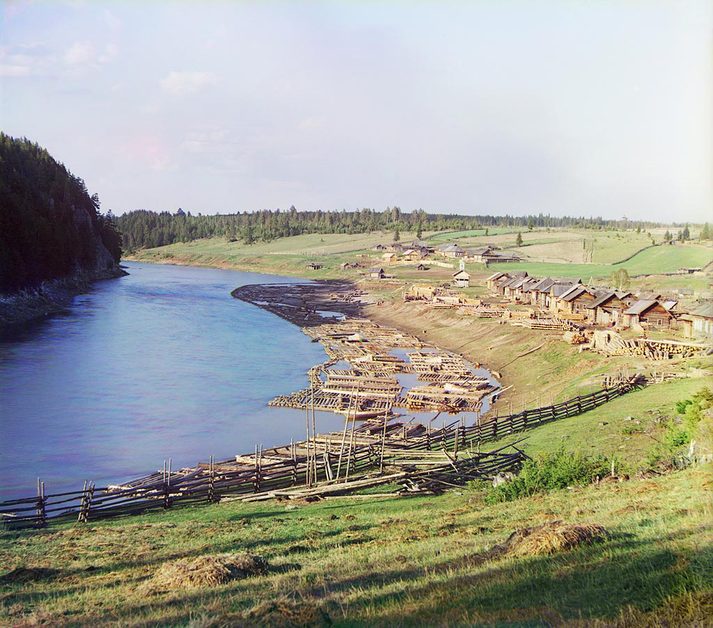 С. М. Прокудин-Горский. Общий вид пристани Кашка. Справа видно впадение р. Кашка. Река Чусовая. 1912 год